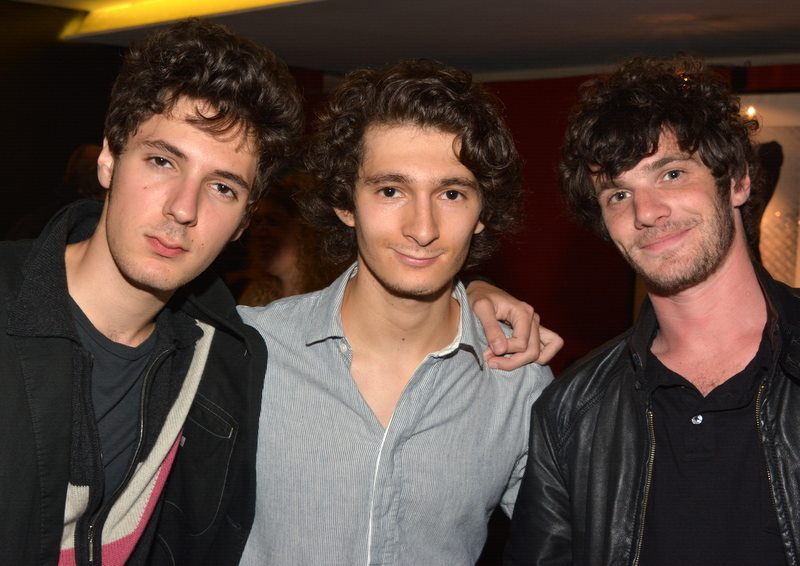 Vincent Lacoste, Anthony Sonigo et Félix Moati à l'avant-première de "Hippocrate"